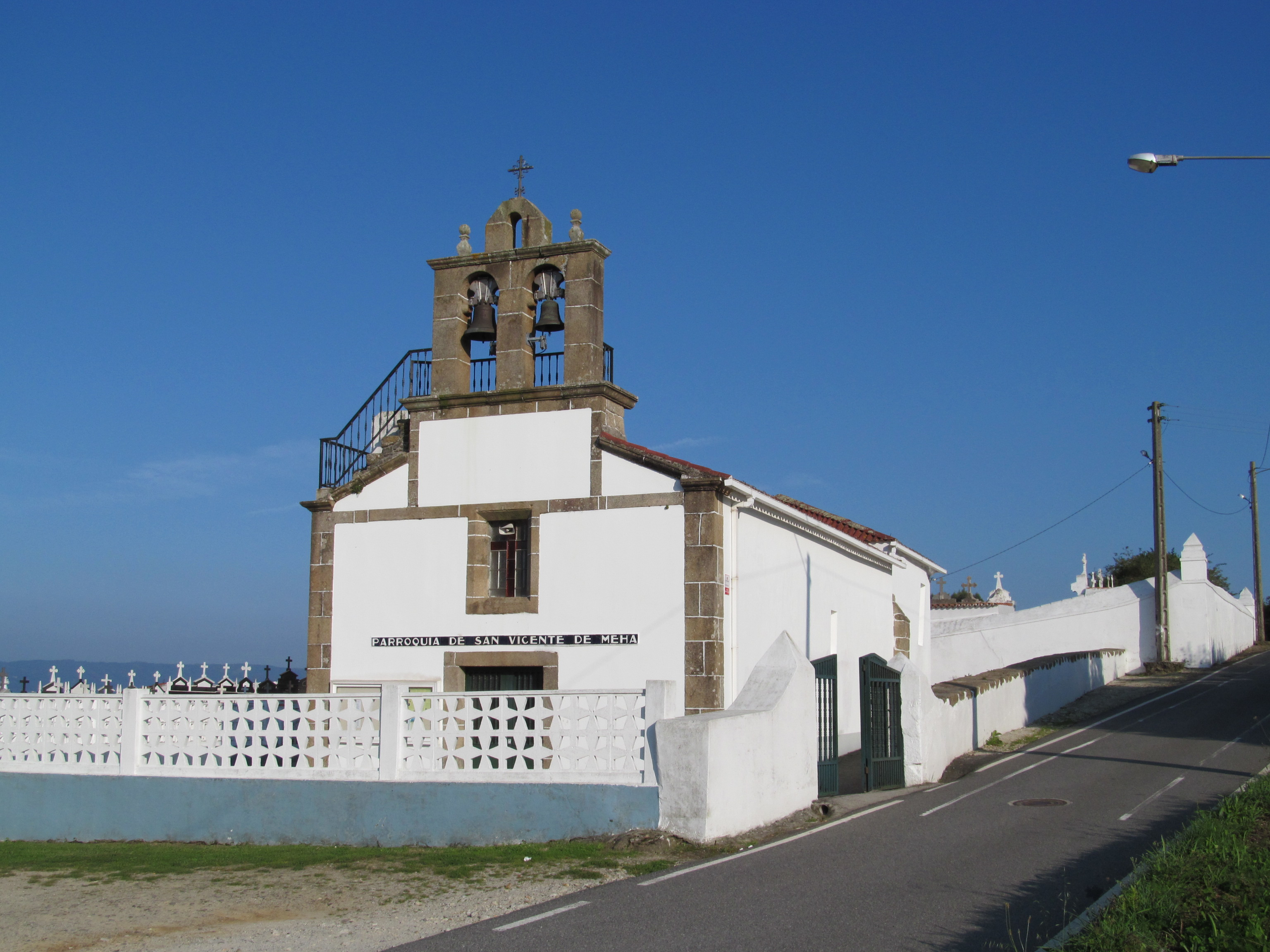 Iglesia parroquial de San Vicente de Meá, en Mugardos, Galicia, España.